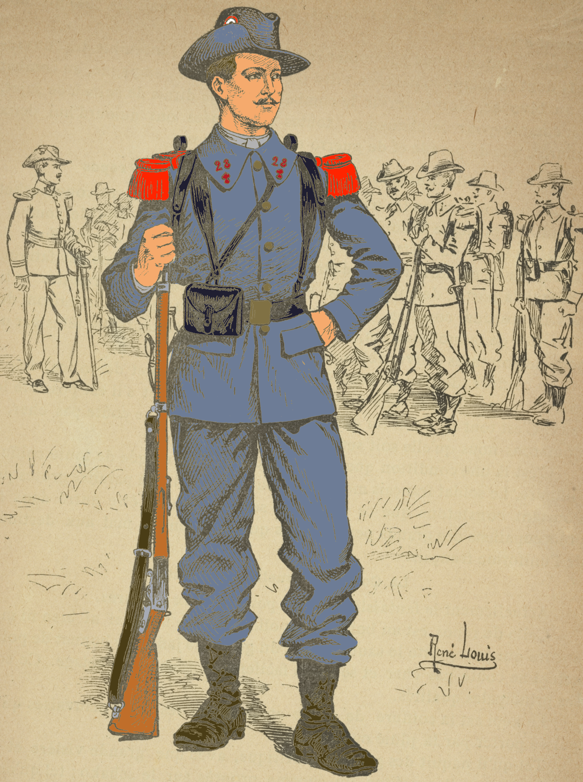 Colorisation d'une gravure présentant la tenue testée en 1903 par le 28e régiment d'infanterie. Infanterie - dernière tenue à l'essai (1903-1904) Soldat. Tenue de service (28e de ligne, en garnison à Paris) Vareuse en drap gris-bleu, à collet rabattu en drap du fond avec grenades et numéros du corps garances, épaulettes écarlates, boutons bronzés. Pantalon en drap gris-bleu. Chapeau en feutre gris-bleu, ruban noir, cocarde tricolore avec petit bouton de cuir au centre. Buffleterie noire. Les officiers ont la même tenue en drap fin ; le collet porte des pattes garance et les grenades et numéros brodés en or ; au chapeau le ruban noir est remplacé par un cordon de soie bleue, une grenade dorée est placée sur le bord supérieur relevé du chapeau. Épaulettes du grade en or ; ceinture en or rayé de rouge ; passepoil rouge au pantalon. Le tapis de selle des chevaux des officiers montés est gris-bleu foncé, bordé d'un galon garance et orné aux angles postérieurs d'une grenade également garance.